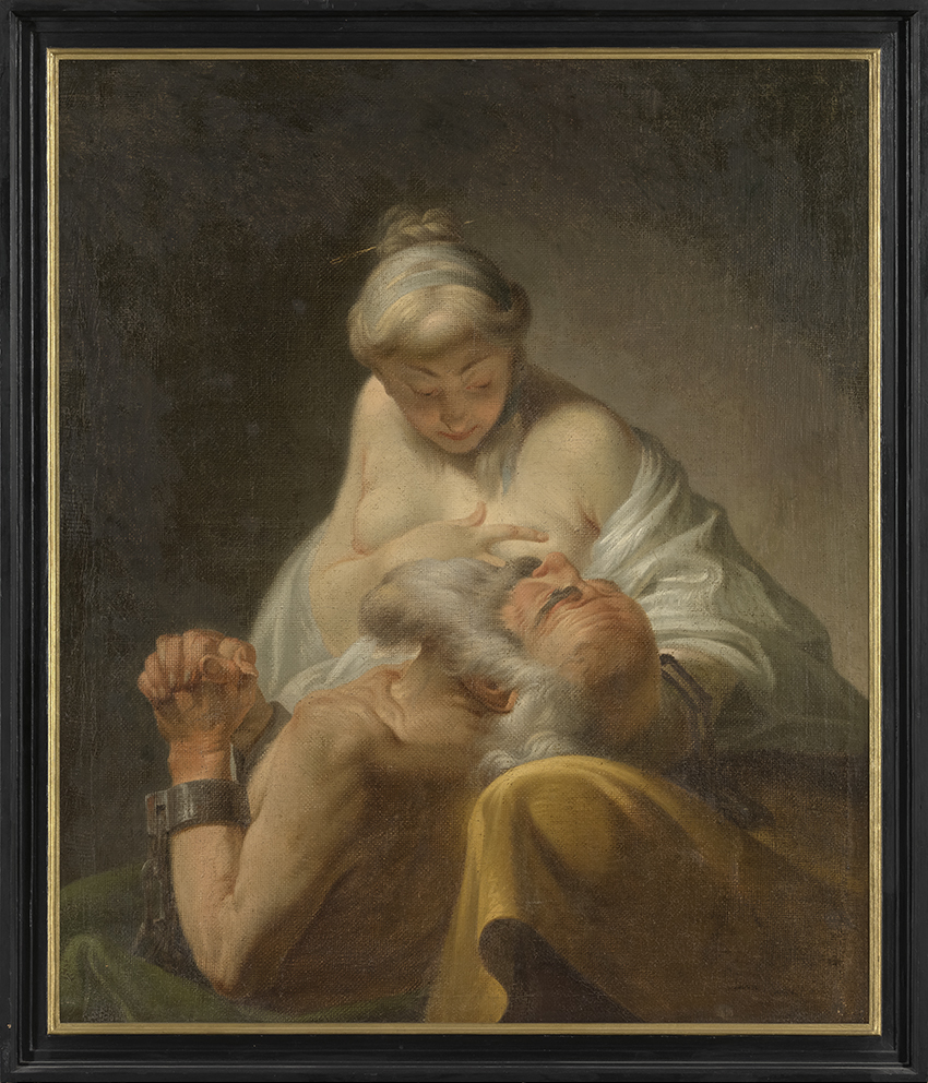 Caritas Romana (Gertrude Cornélie Marie de Pélichy, circa 1763 - circa 1825); collection: Musea Brugge - Groeningemuseum